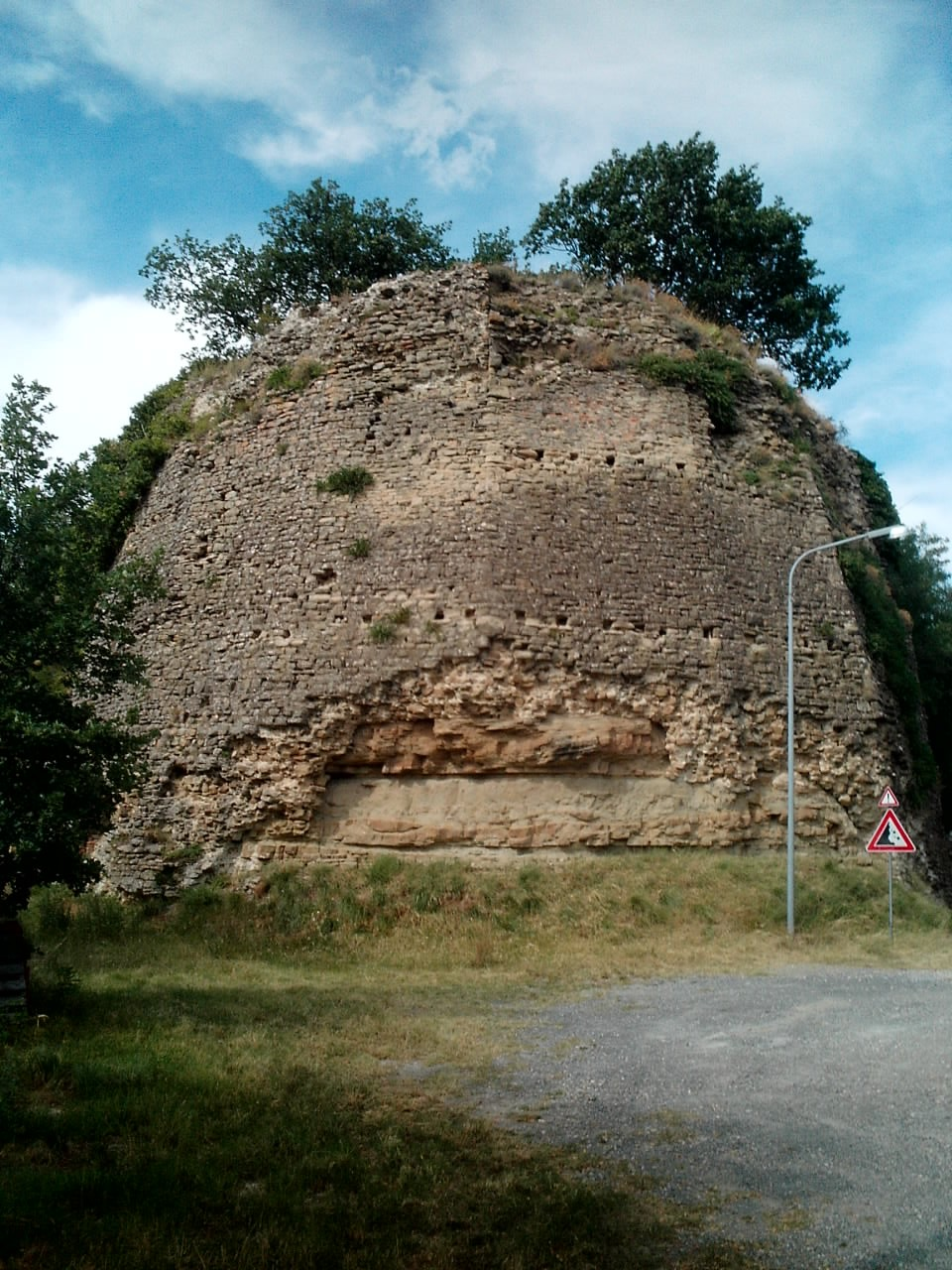 Foto del bastione del Castello di Giaggiolo, presso Forlì